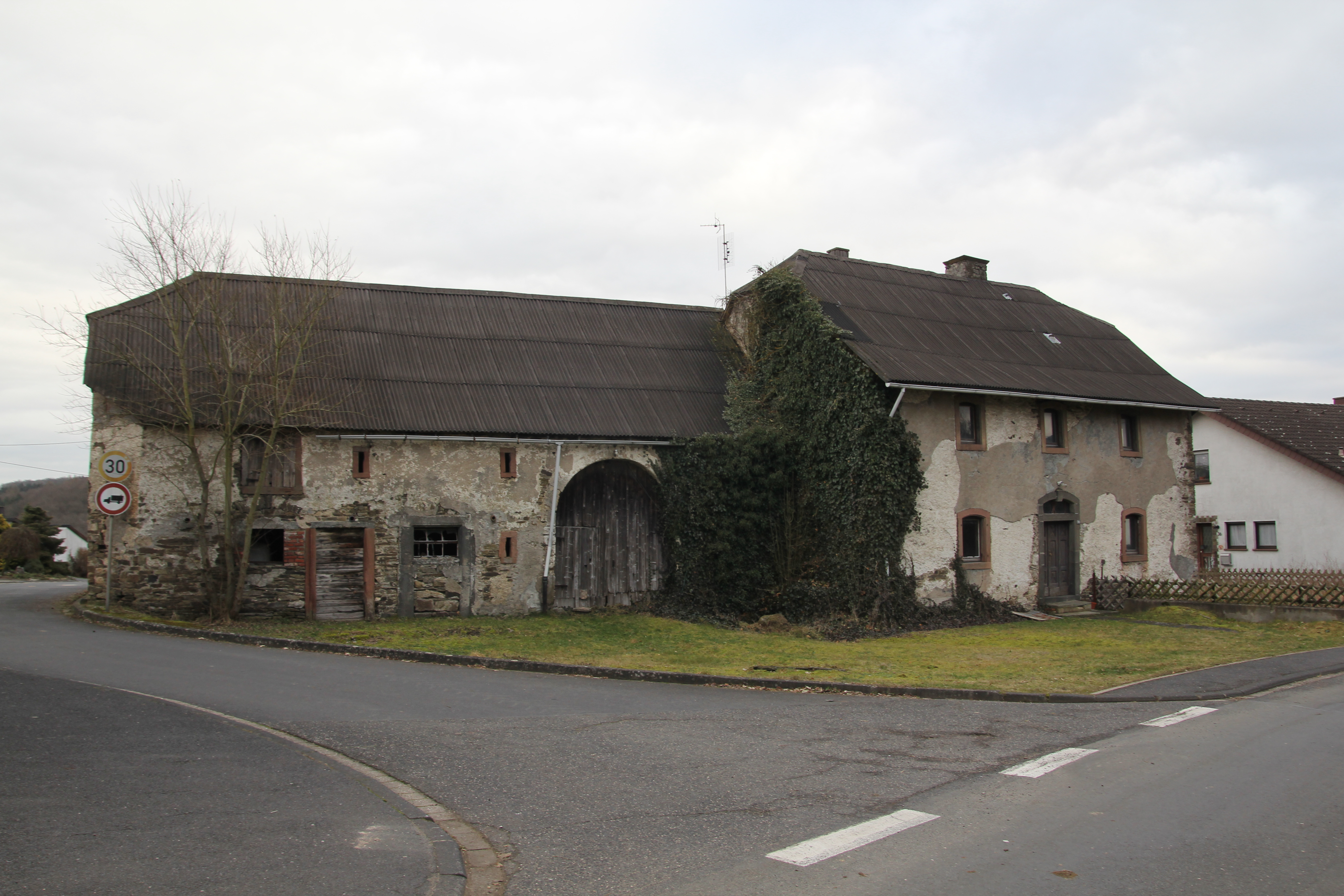 Streckhof